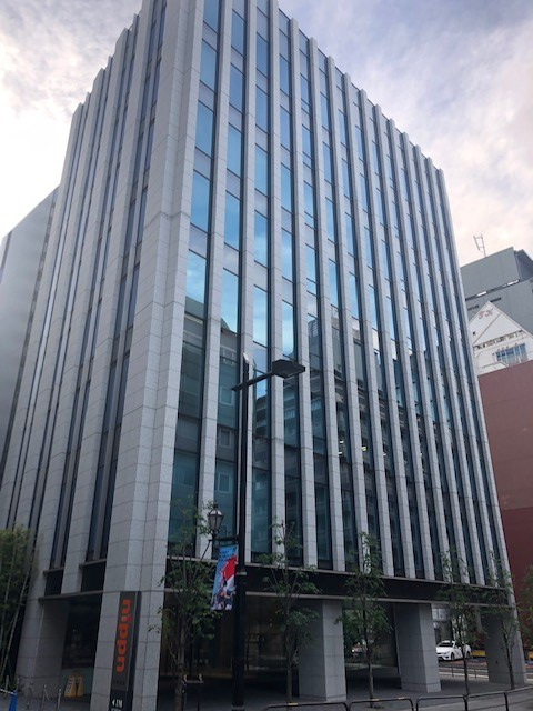 日本製粉株式会社 本社ビル（2016～）